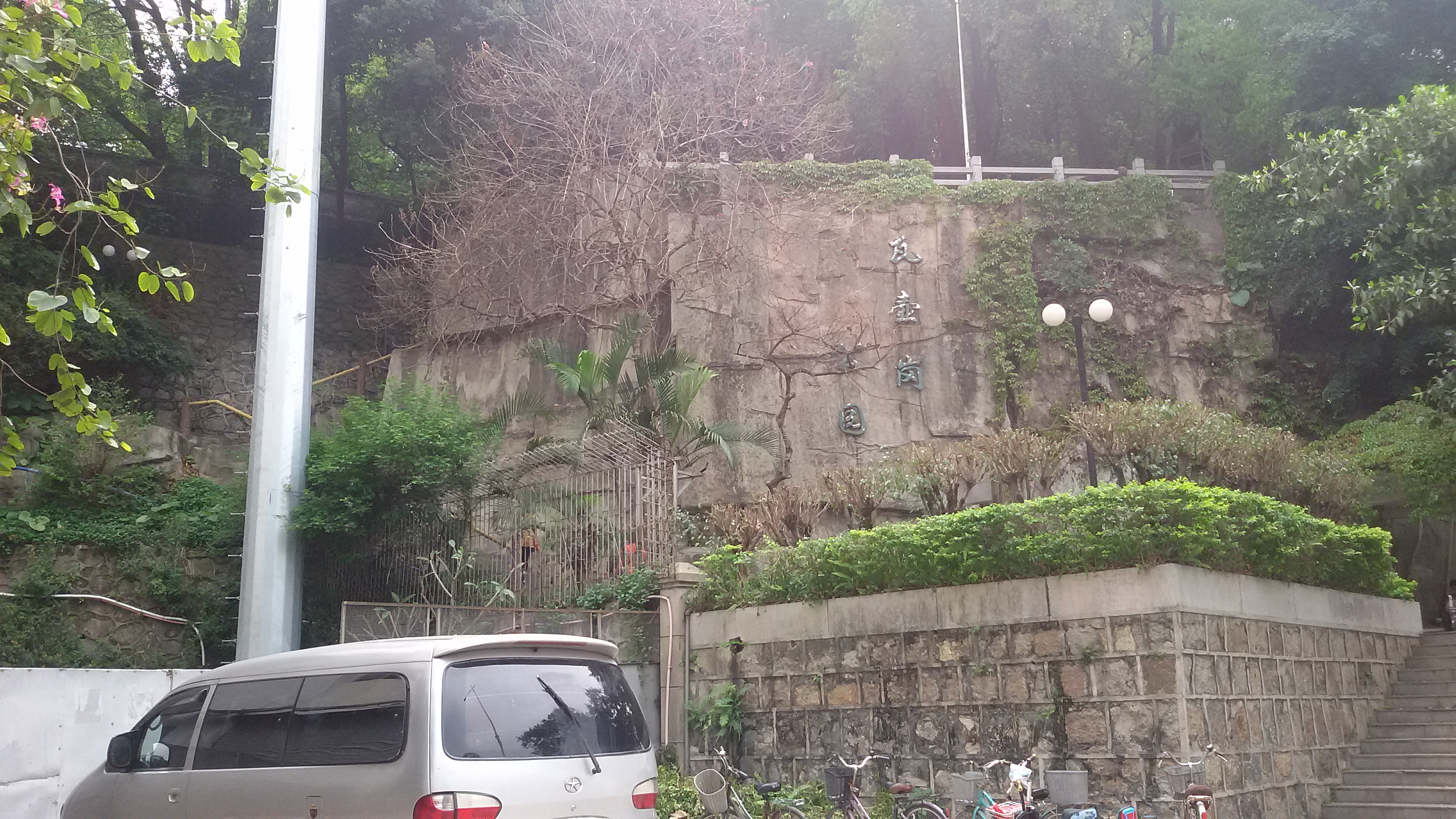 粵語: 瓦壺崗公園